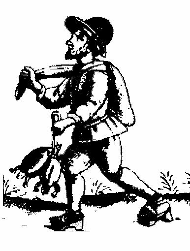 Venditore ambulante di tartarughe.(G. A. Remondini, Nuovo et ultimo ritratto di tutte l’arti che vanno vendendo per la città di Roma, stampata in Bassano tra il 1640 e il 1712).